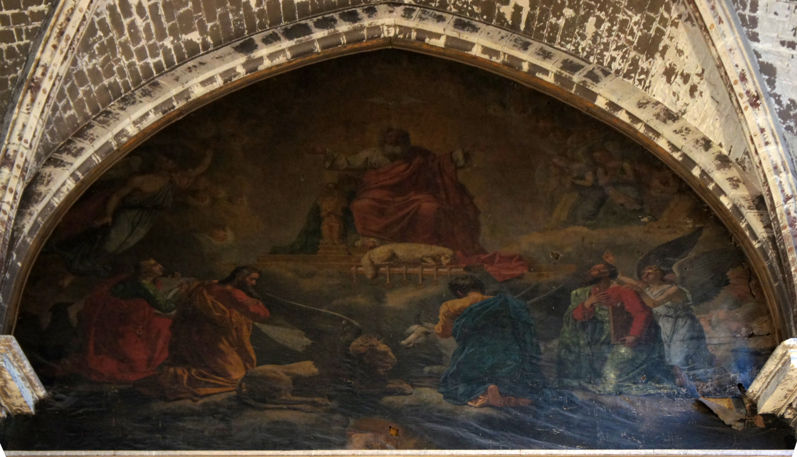 Peinture dans l'Église Saint-Maurice (Reims).